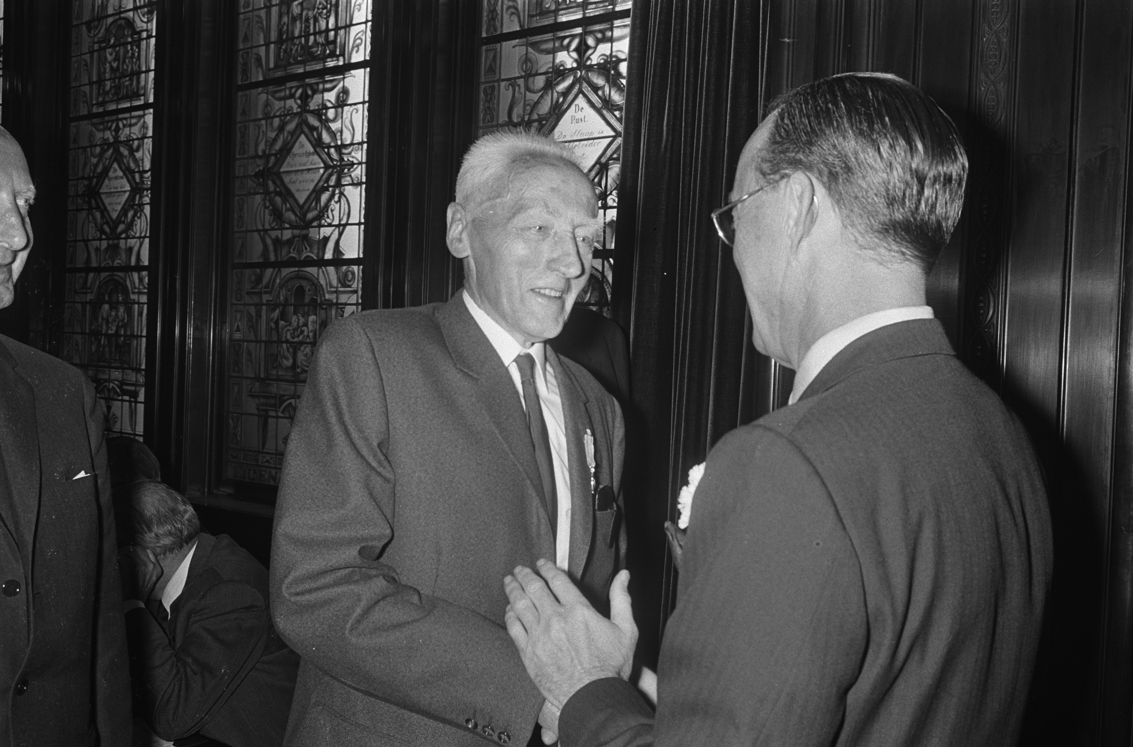 Collectie / Archief : Fotocollectie Anefo Reportage / Serie : Uitreiking Zilveren Anjers door prins Bernhard Beschrijving : De heer Wiegersma en prins Bernhard Datum : 27 juni 1967 Trefwoorden : culturele prijzen, huldigingen, onderscheidingen, prinsen, vrijwilligers Persoonsnaam : Bernhard, prins (1911-2004), Wiegersma, M. Instellingsnaam : Zilveren Anjer Fotograaf : Fotograaf Onbekend / Anefo Auteursrechthebbende : Nationaal Archief Materiaalsoort : Negatief (zwart/wit) Nummer archiefinventaris : bekijk toegang 2.24.01.05 Bestanddeelnummer : 920-4425 Reacties Geplaatst door Maaike op 06 november 2012 - 18:45. Instellingsnamen: Prins Bernhard-fonds (thans Prins Bernhard Cultuurfonds) locatie: Algemene Bank Nederland (ABN) plaats: Amsterdam